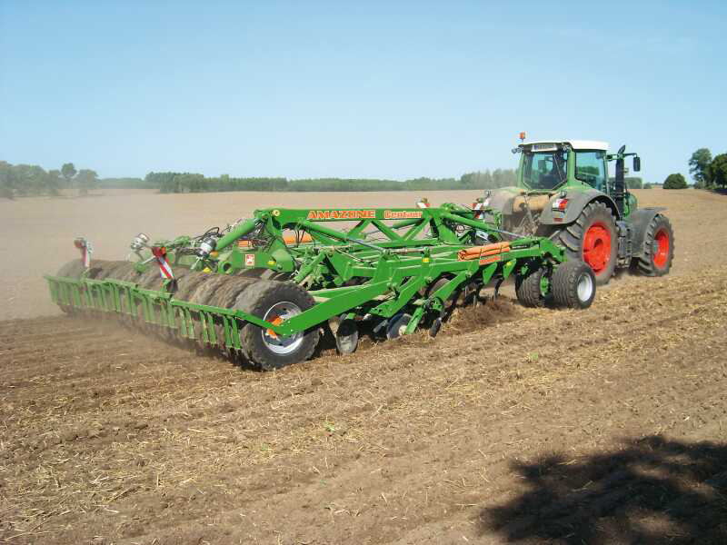 Fendt-Traktor mit Grubber-Scheibeneggen-Kombination Centaur (mit gut sichtbarer Nachläufer-Keilringreifenwalze) von Amazone in Deutschland; der Centaur ist eine multifunktionale Bodenbearbeitungs-Kombination speziell für den pfluglosen Ackerbau.